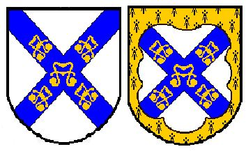 Een Sacheverell wapen en een bastaard van die familie. Eigen tekening.